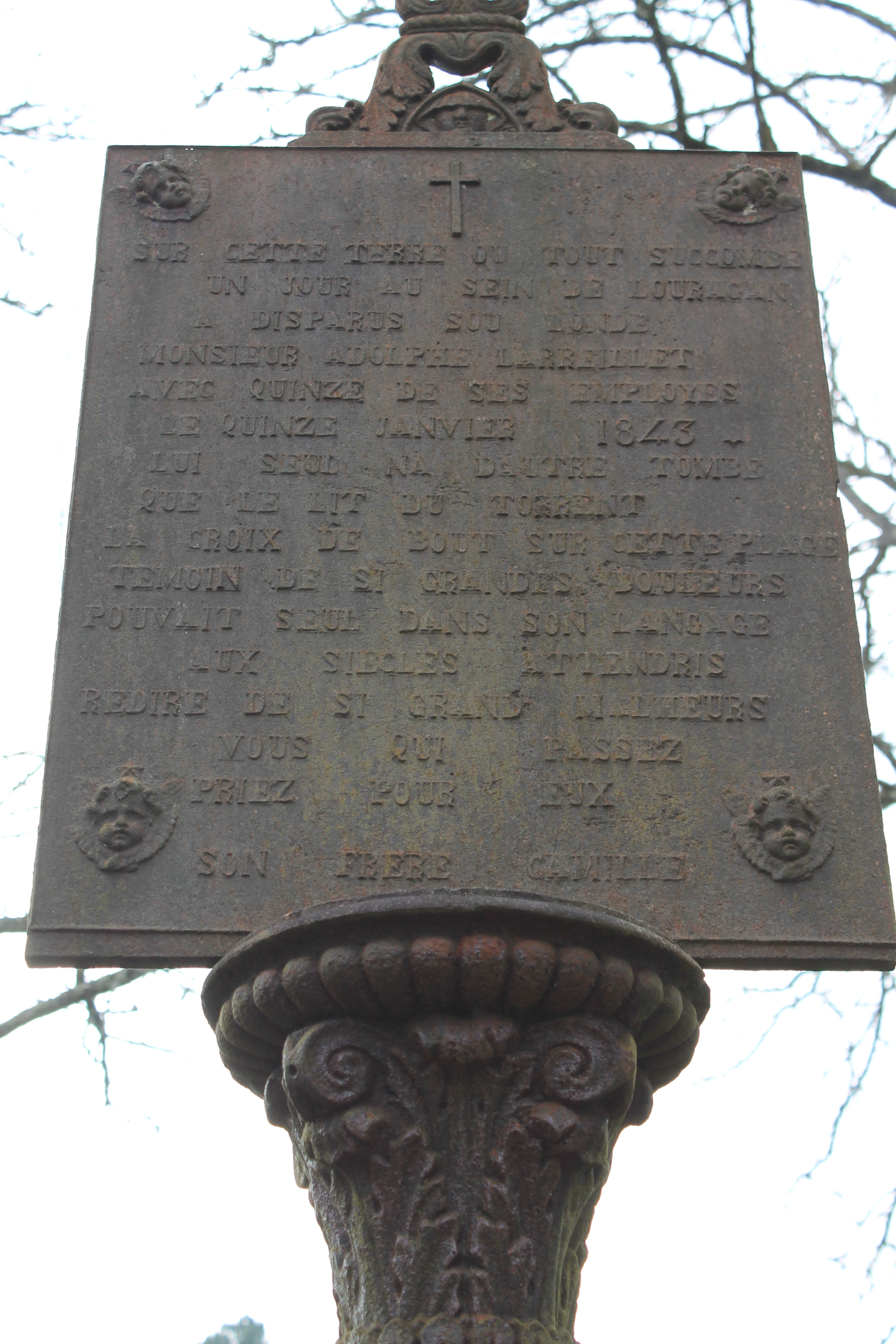 Monument hommage à la noyade de Brocas.